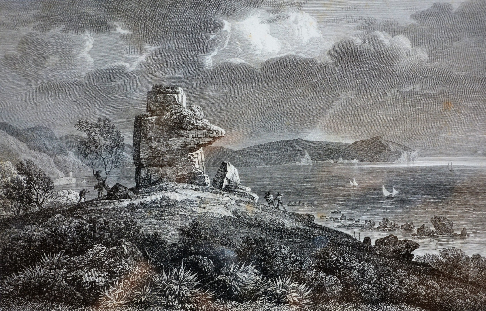 Cénotaphe de Palinurus, gravure, 21,2 x 29,5 cm